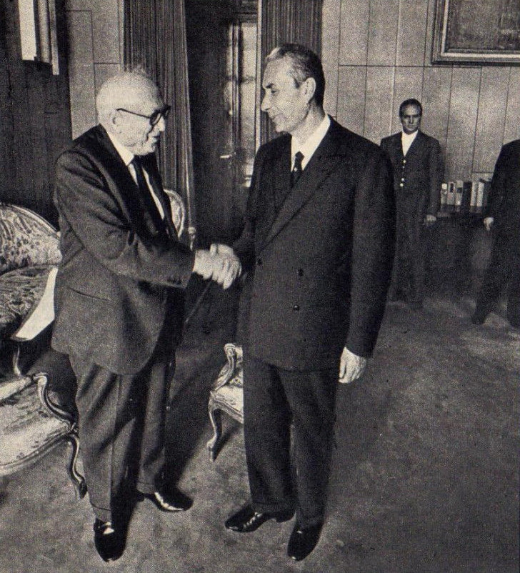 Aldo Moro and Pietro Nenni at Quirinale in Rome